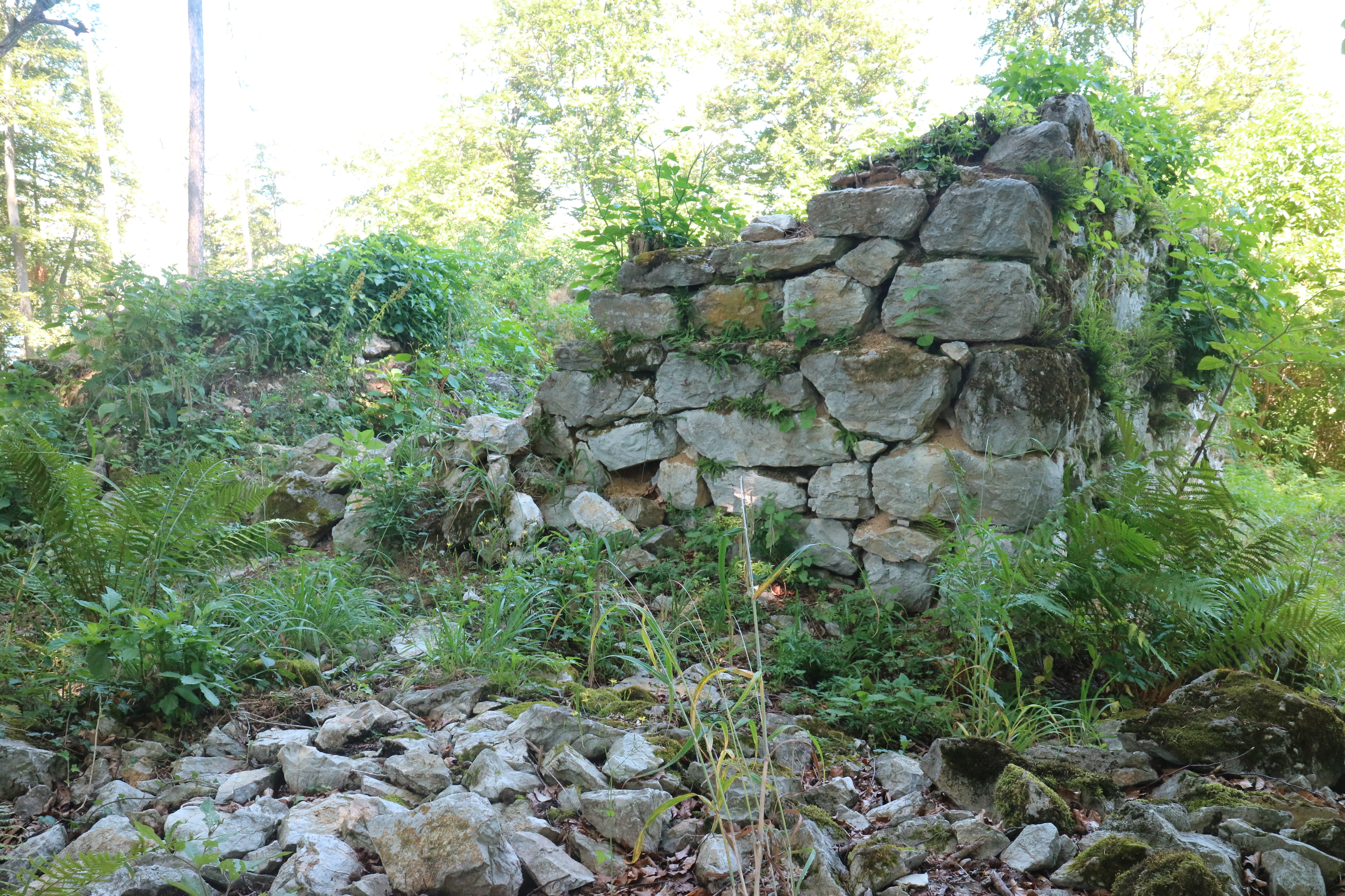 Verfallene Grundmauerreste der Goldhannwarte (1892–1908) am Frauenkogel, Graz-Gösting/Marktgemeinde Gratwein-Straßengel (Steiermark)